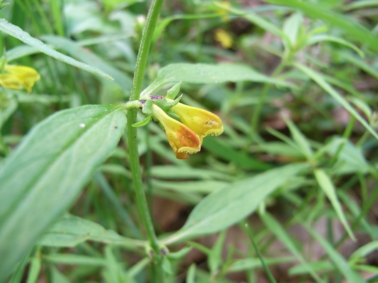 Wald-Wachtelweizen